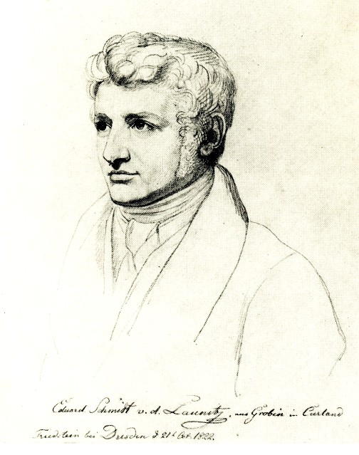 Porträt des Bildhauers Eduard Schmidt von der Launitz